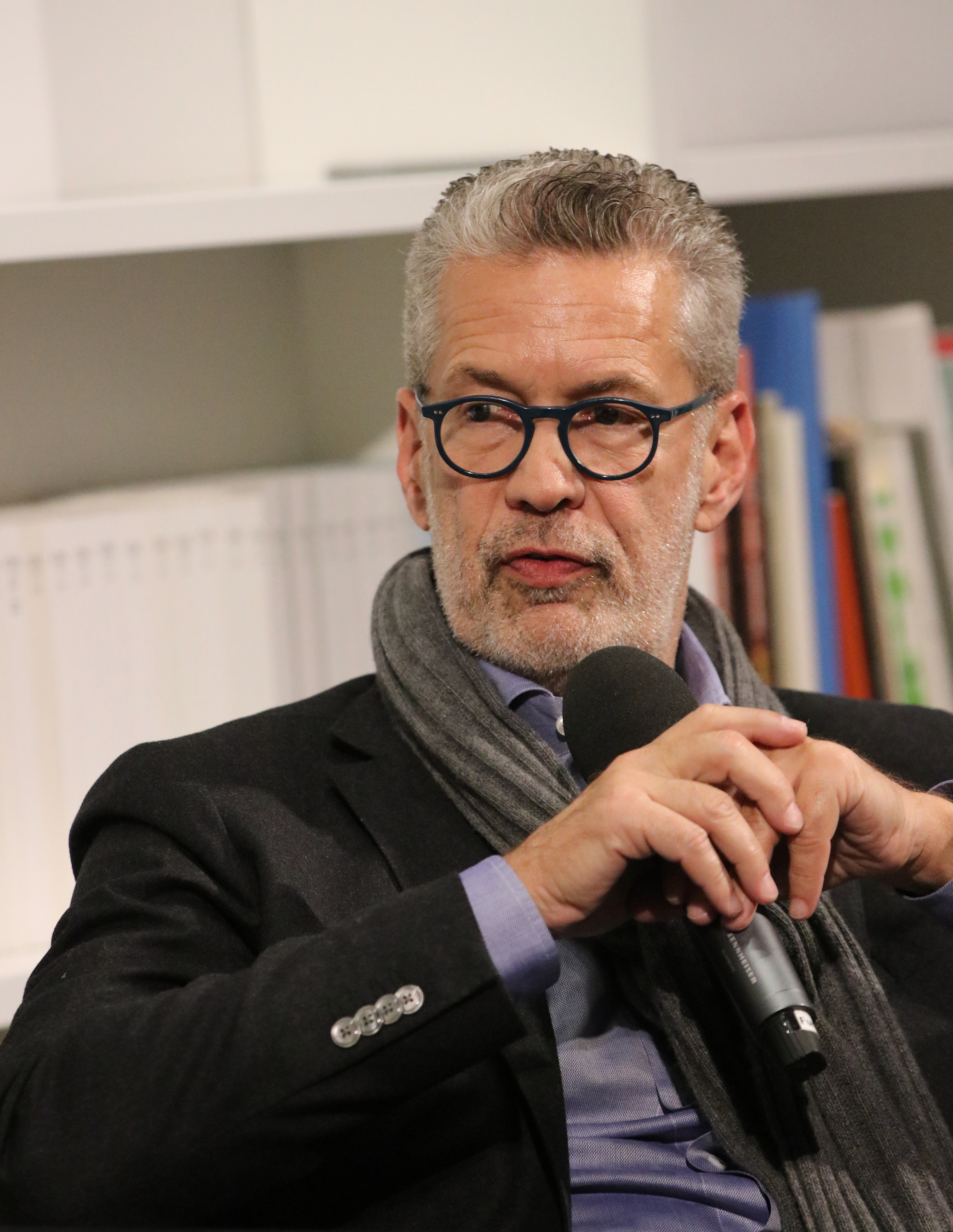 Der Journalist Richard C. Schneider auf einer Podiumsdiskussion der Münchner Monacensia zum Thema "Anstand, Freiheit, Toleranz - Öffentliche Debatte über die Ideale der Demokratie" im Rahmen der der Ausstellung "Erika Mann".